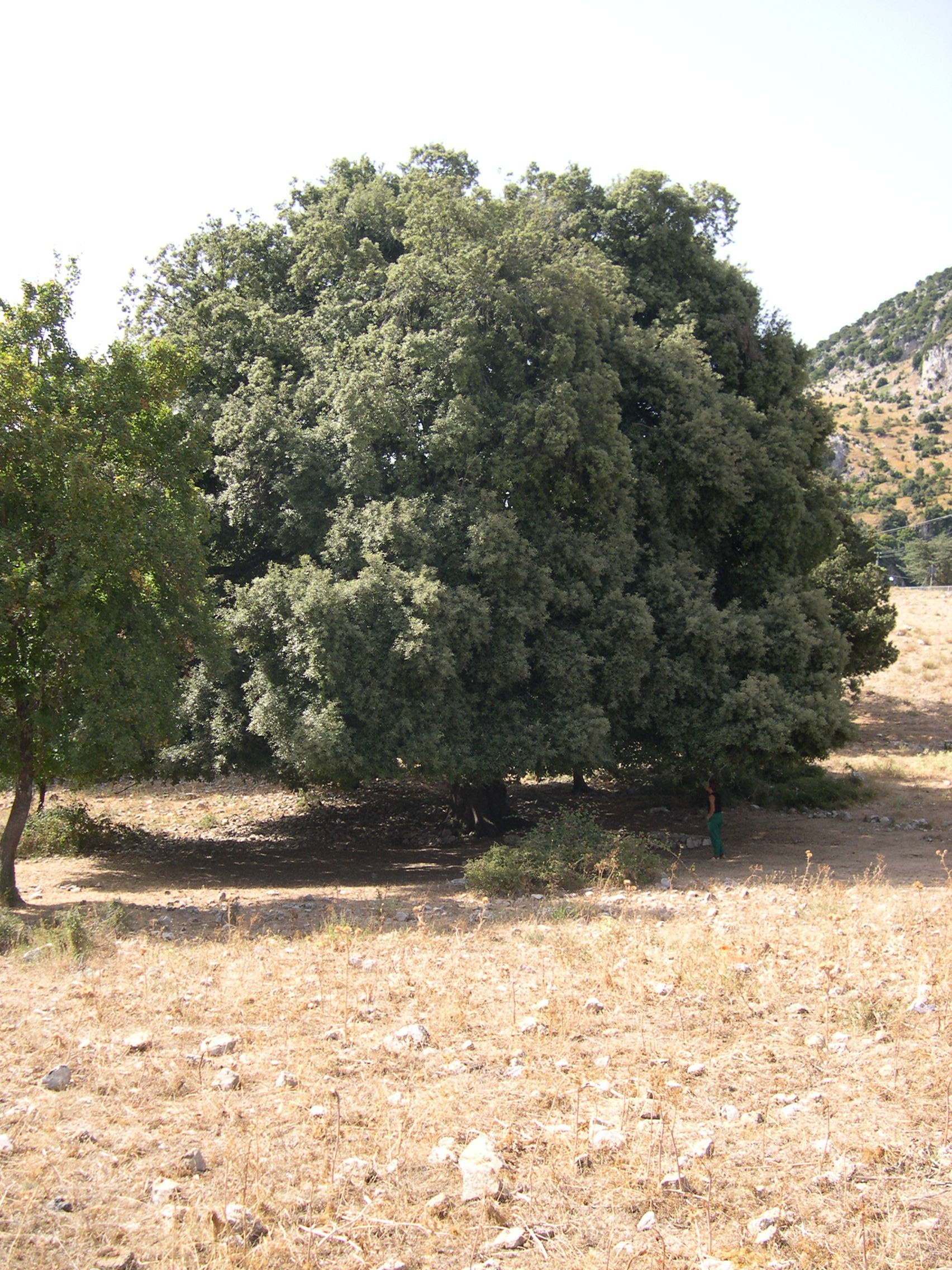 Leccio (Quercus ilex) nel Parco delle Madonie in Sicilia